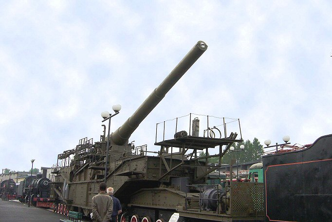 Spoorwegmuseum (vm. Warschaustation) te St. Petersburg. Eigen foto, augustus 2002. categorie:Afbeelding trein